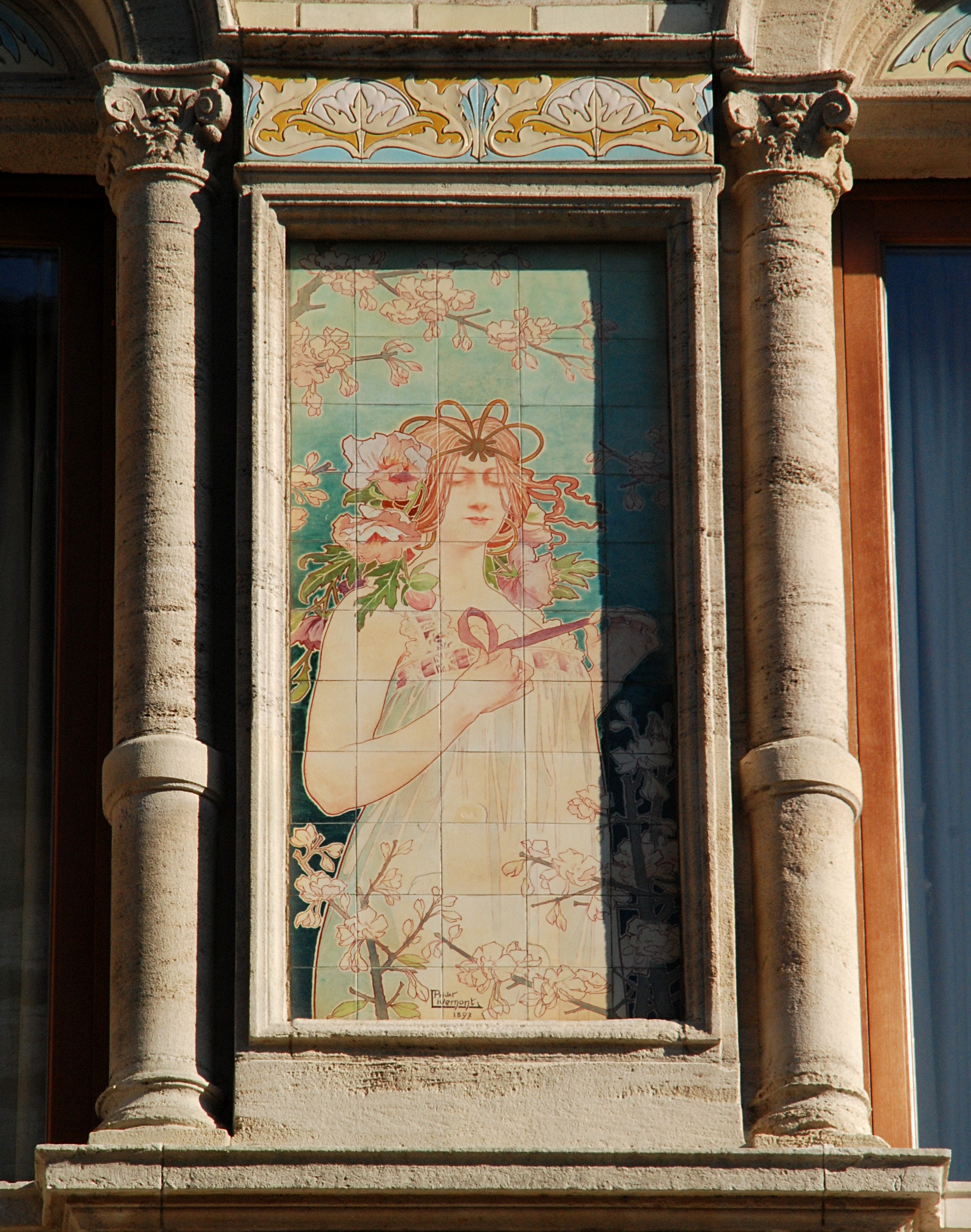 Grande Maison de Blanc, rue du Marché aux Poulets, 32-34 à Bruxelles (Belgique), céramiques de Privat Livemont